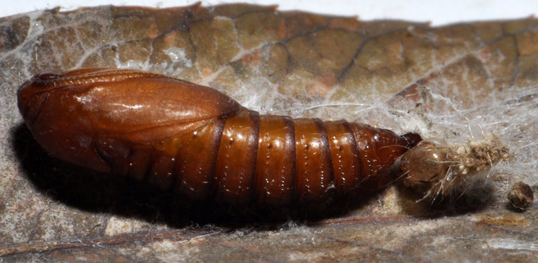 Cacoecimorpha pronubana pupa